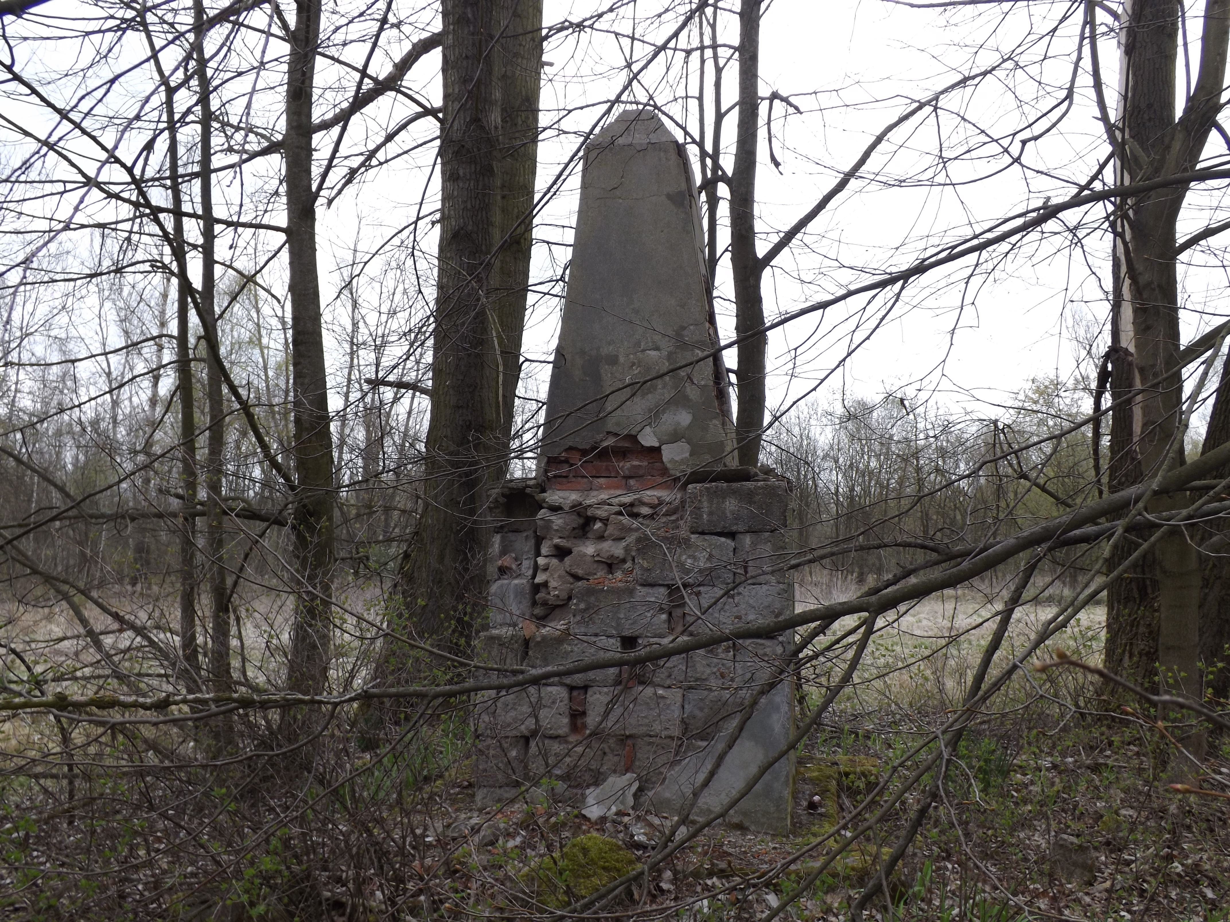 Dobrów pomnik upamiętniający walki armii radzieckiej o przyczółek baranowsko-sandomierski